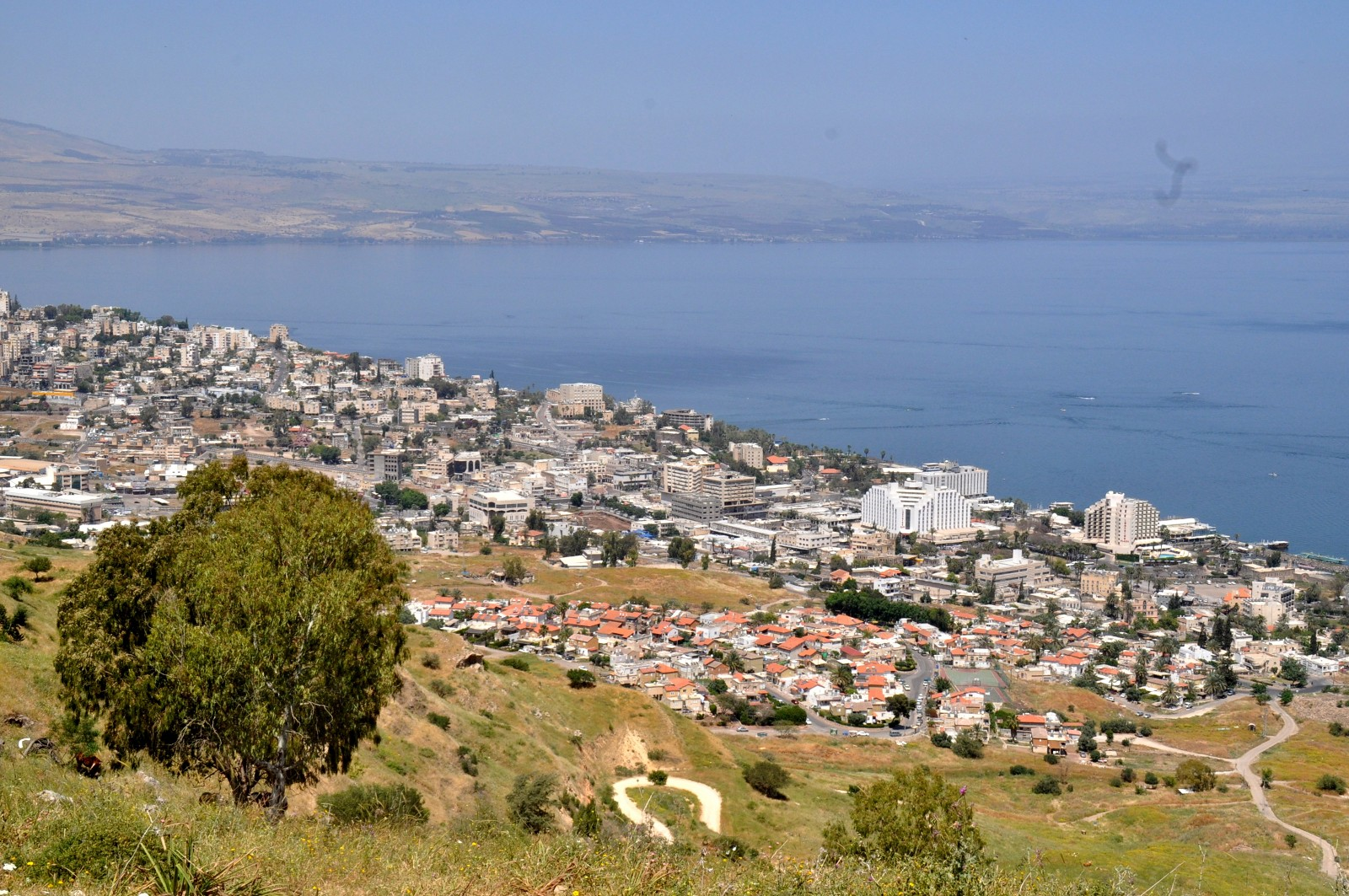 Tiberias